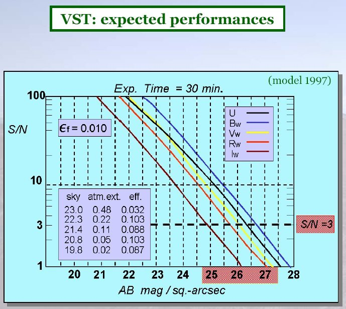 performances ov VST telescope